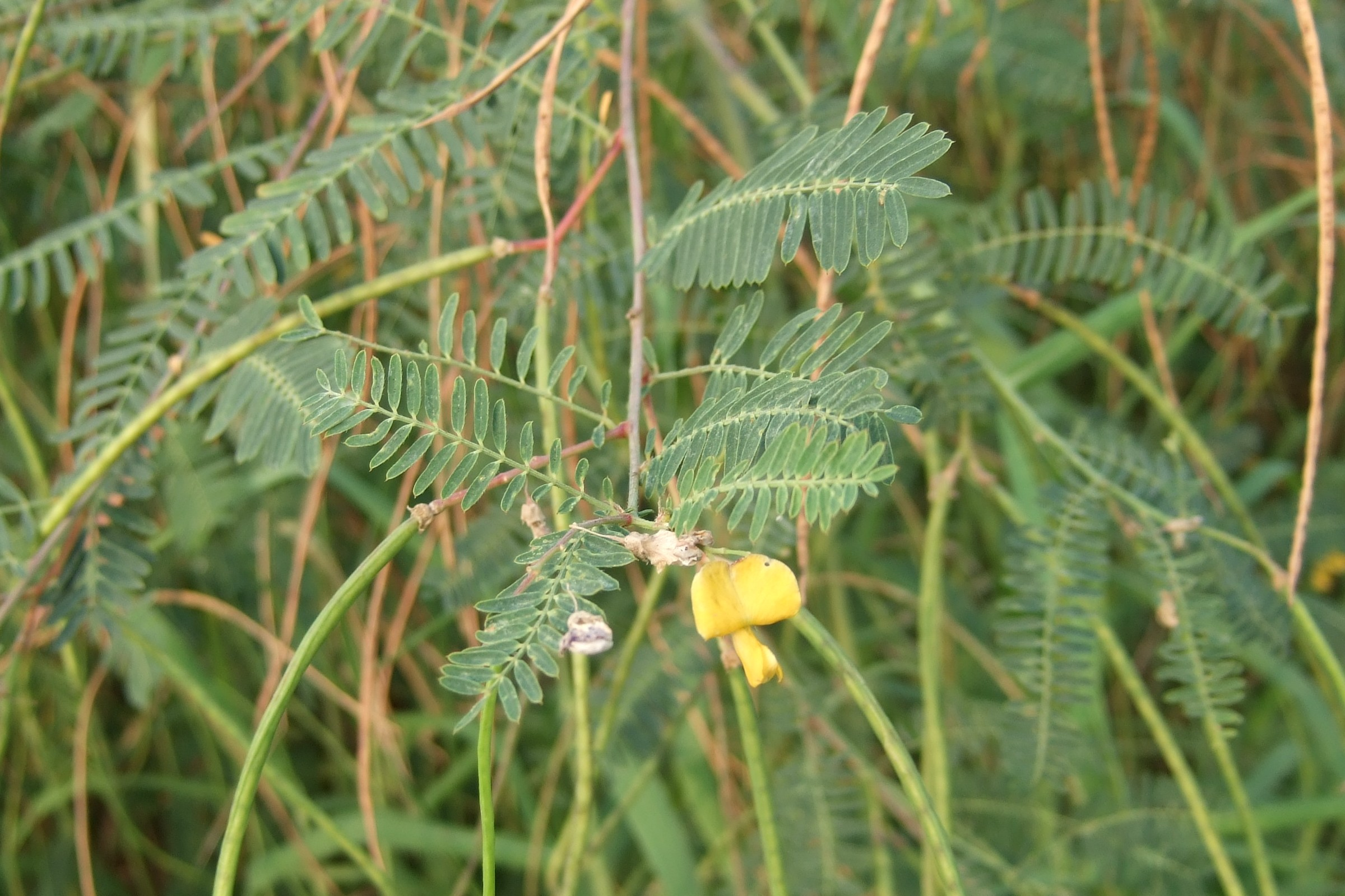 Sesbania cannabina; Tiân-cheng; 田菁